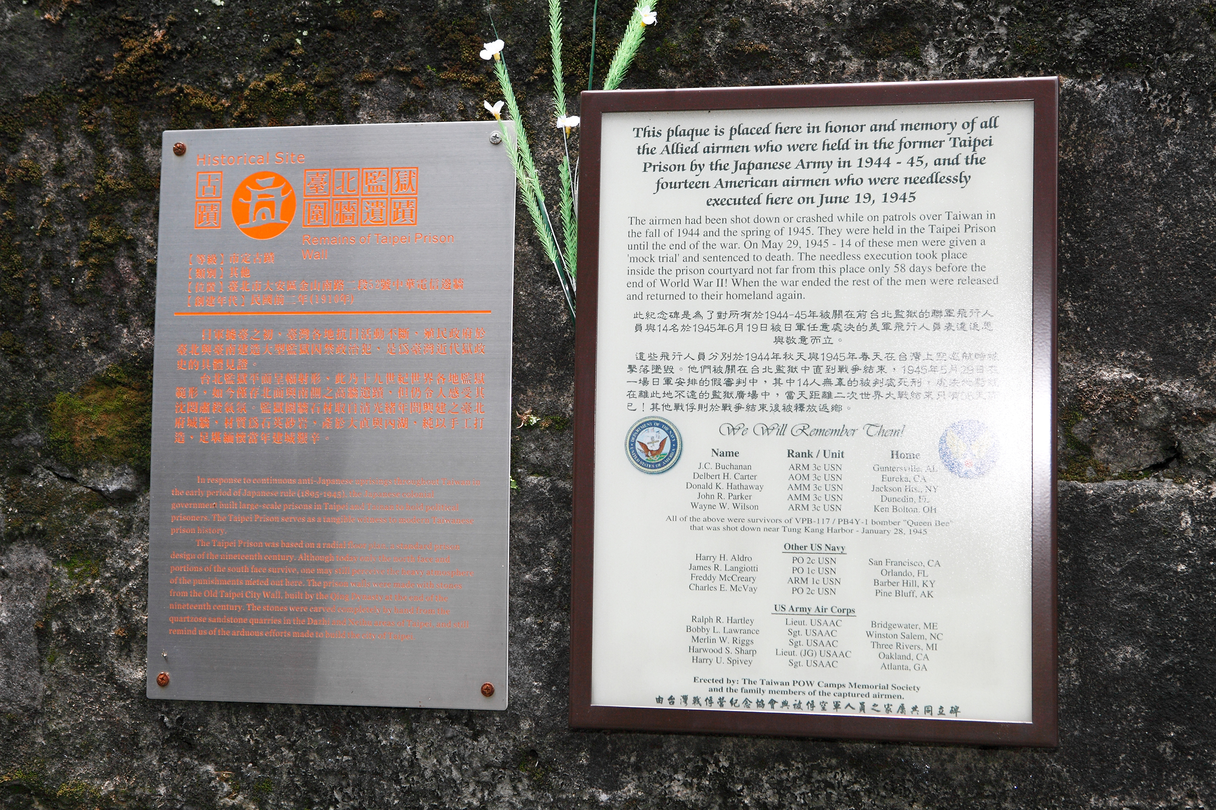 中文（台灣）: 臺北監獄圍牆遺蹟解說牌（左）與被俘美軍飛行人員紀念牌（右）。